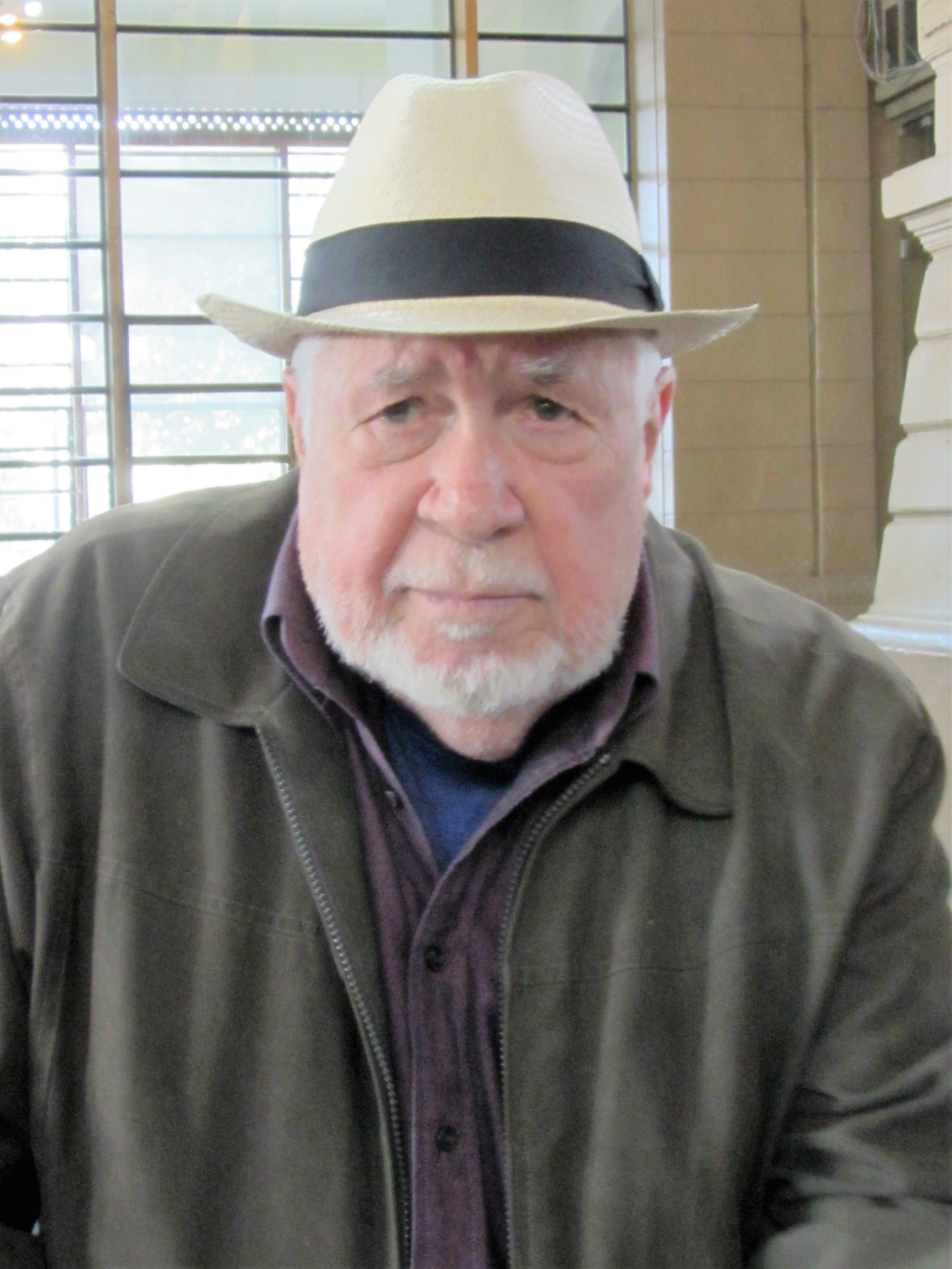 El escritor chileno Poli Délano en la Feria Internacional del Libro de Santiago 2016